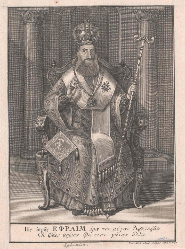 Патриарх Иерусалимский Ефрем II